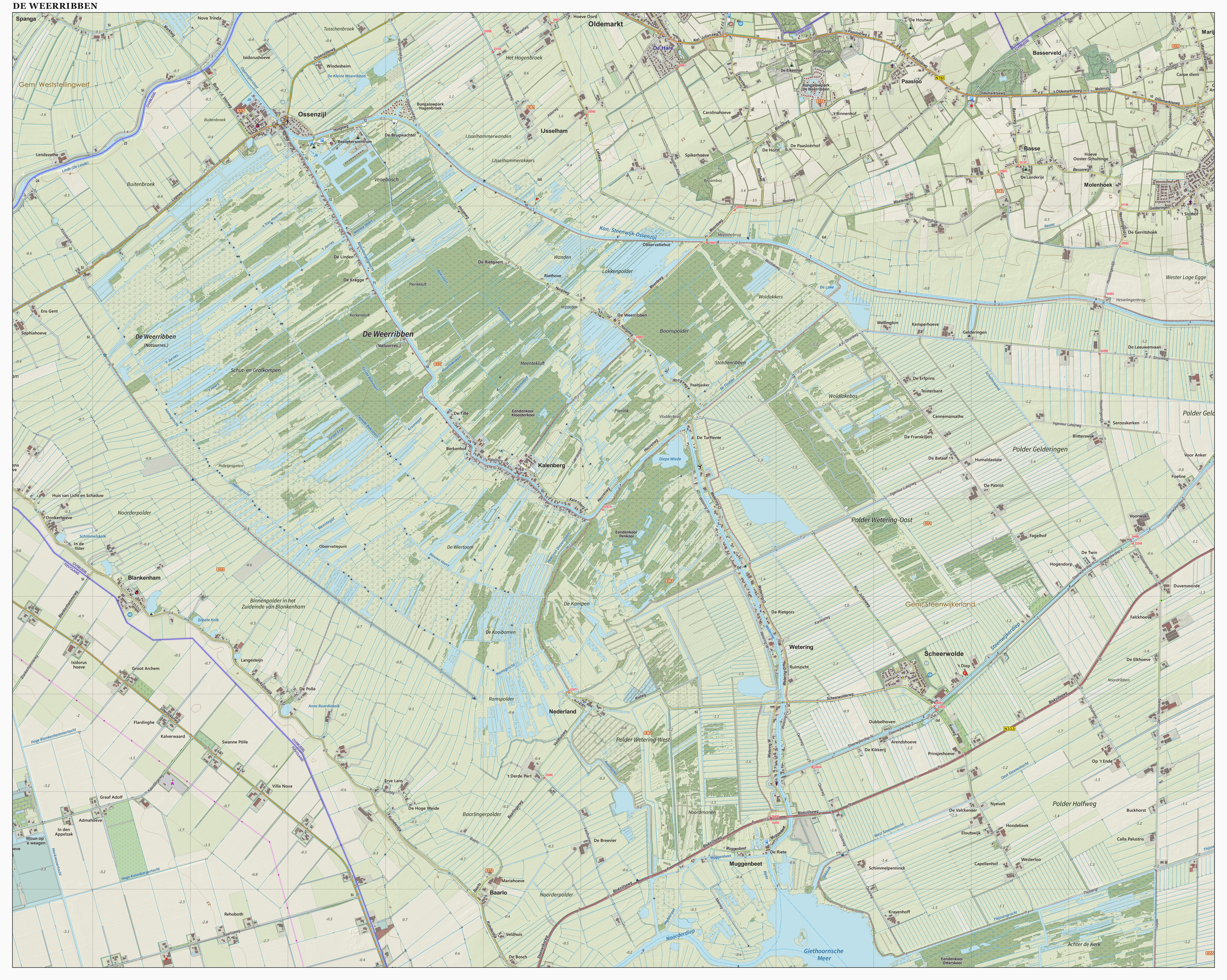 Topografische kaart van de Weerribben (natuurgebied). Resolutie: 400 pixels/km. Samengesteld door Jan-Willem van Aalst op basis van de GML open geodata van de BRT/Top10NL (basisregistratie Topografie, Kadaster), vrijgegeven door Kadaster onder de Creative Commons BY licentie. Additionele gegevens uit BAG uit de Open Street Map en uit de Risicokaart. Zie ook de Legenda.